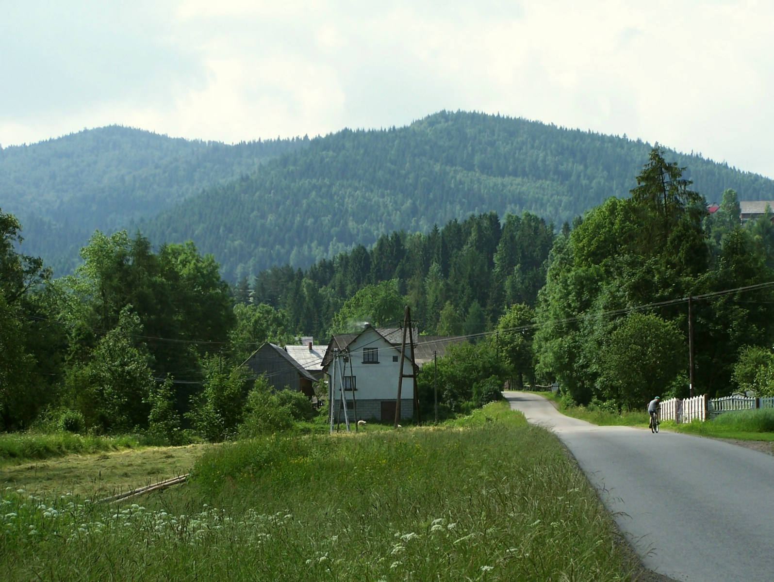 Jasień (Beskid Wyspowy). Widok z Półrzeczek